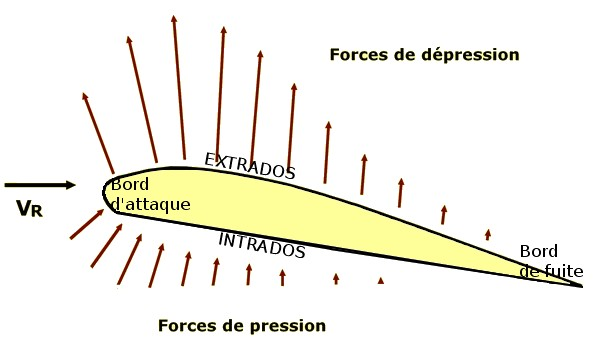 Un profil d'aile avec sa légende.